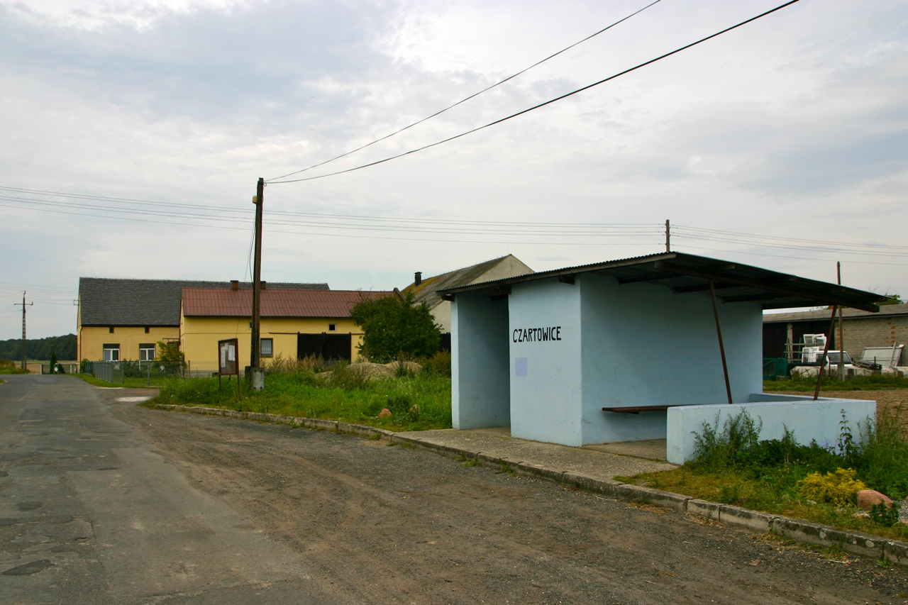 Czartowice (dodatkowa nazwa w j. niem. Schartowitz – wieś w Polsce położona w województwie opolskim, w powiecie prudnickim, w gminie Biała.